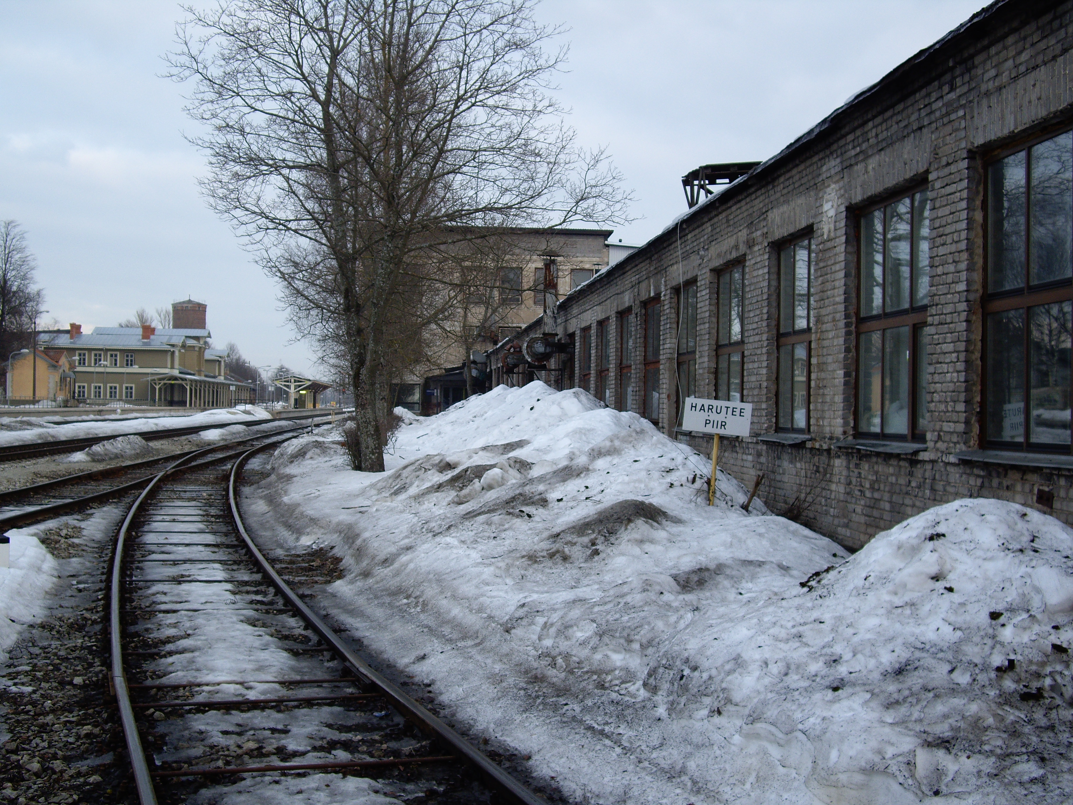 Tartu raudteejaam